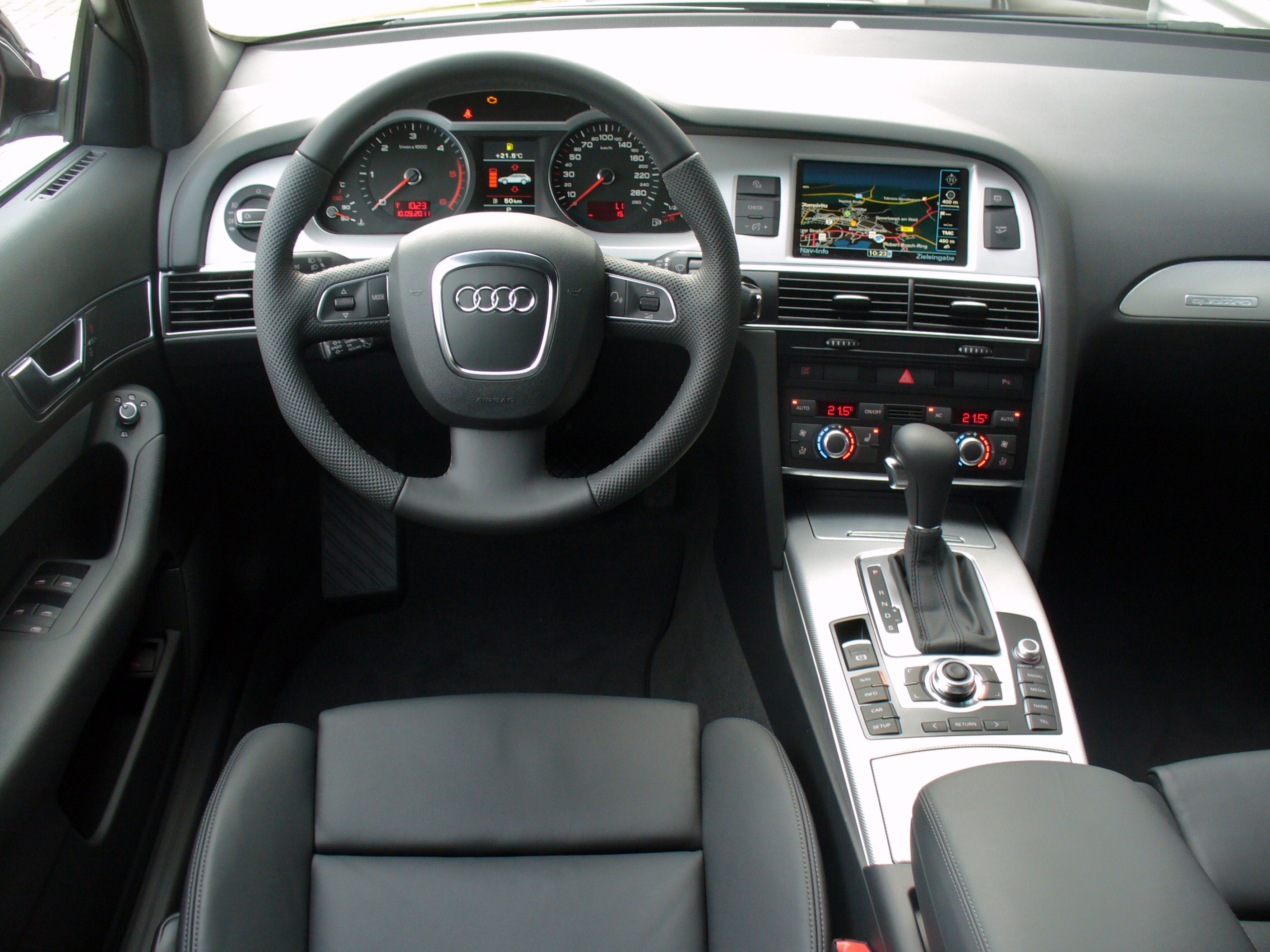 Audi A6 allroad quattro